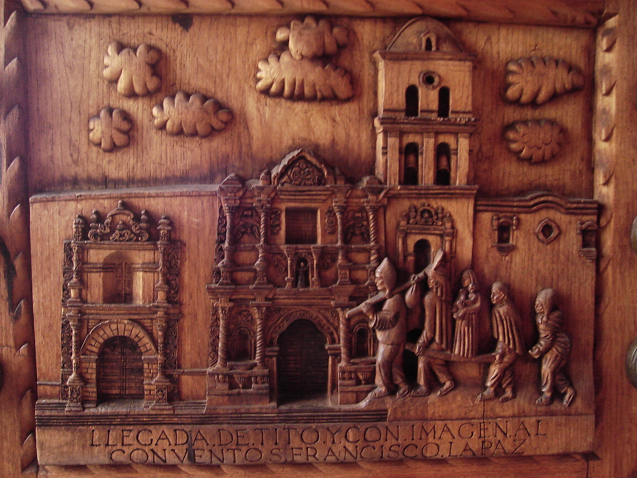 Porta da igreja Nossa Senhora de Copacabana. Foto tirada por mim, em Copacabana.